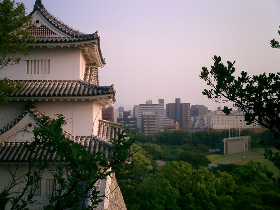 Akashi_Castle_Hitsujisaruyagura